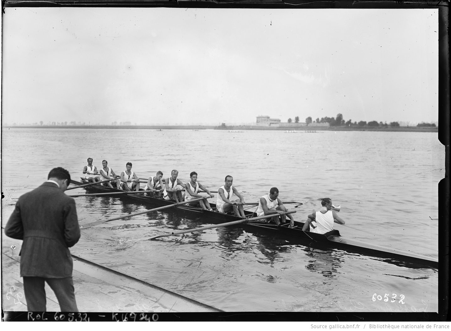 Grasshoper Club Zurich, [équipe] gagnante du 8 [de pointe, championnats d'Europe d'aviron, Mâcon, 15/8/20] : [photographie de presse] / [Agence Rol]